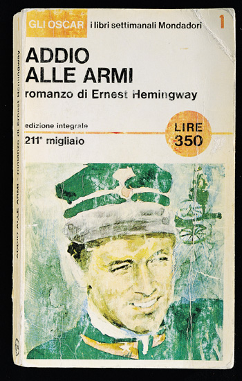 Copertina del romanzo Addio alle armi di Ernest Hemingway. Il primo numero della collana Oscar Mondadori è il "romanzo italiano" di Hemingway. Al successo del volume contribuisce il richiamo implicito al film nella copertina di taglio cinematografico, con l'immagine del protagonista, l'attore americano Rock Hudson. Fu stampato in 60.000 copie, che andarono tutte esaurite nel primo giorno di uscita, il 27 aprile 1965.